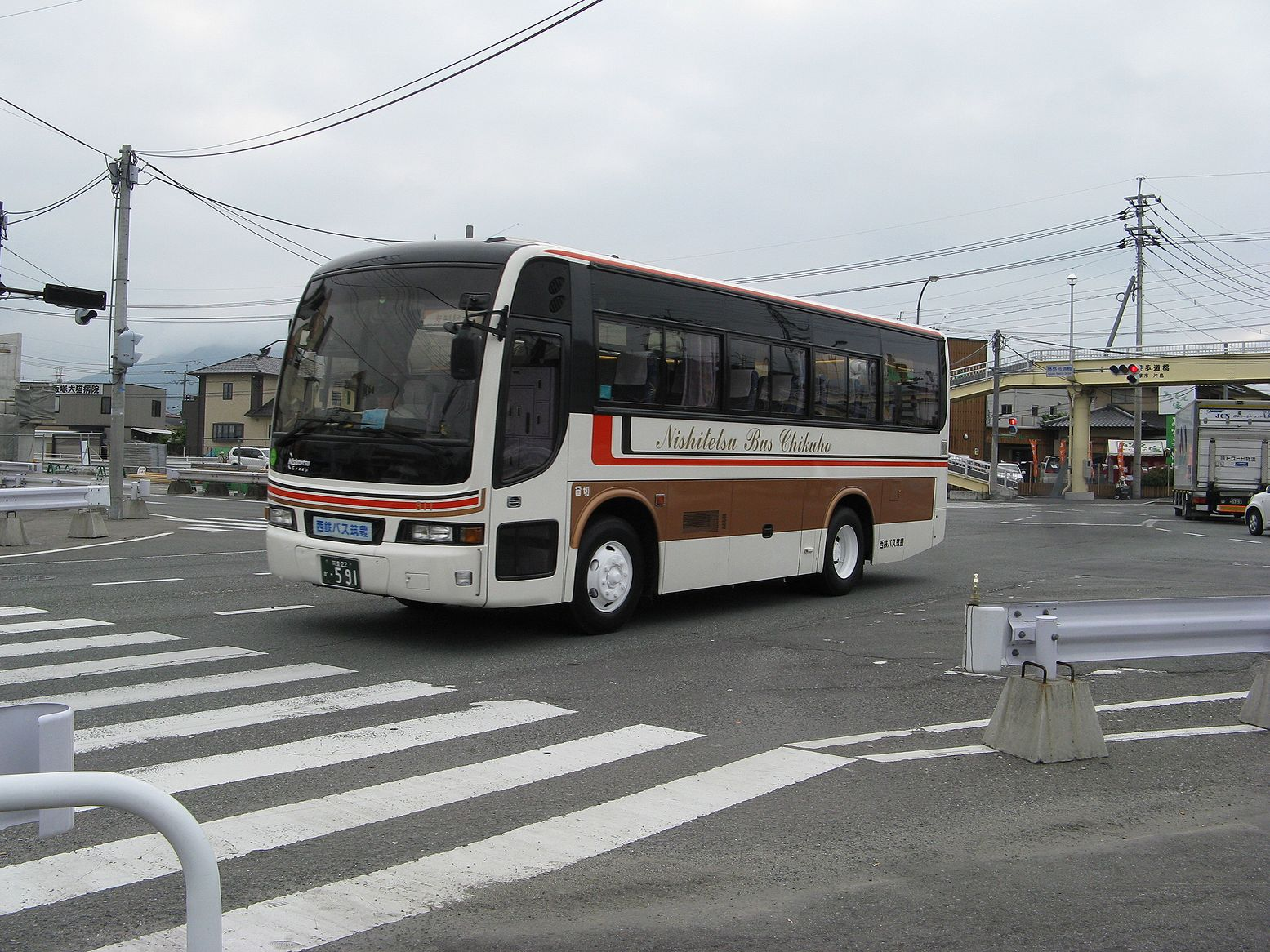 西鉄バス筑豊 貸切車 勝盛歩道橋交差点にて